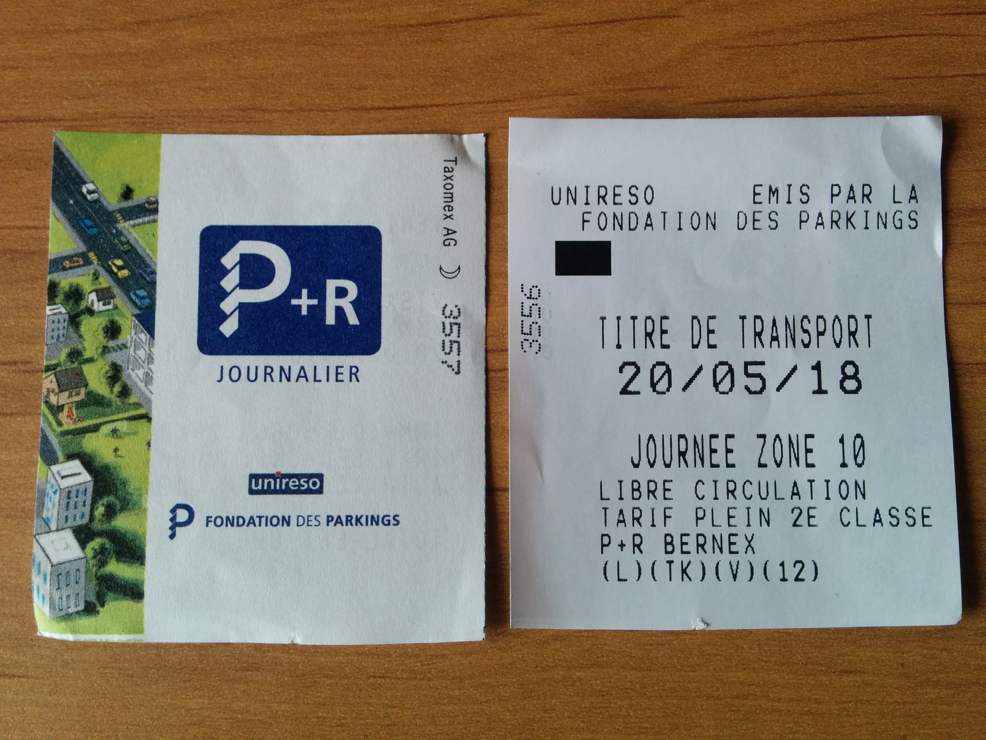 Billet journalier Unireso émis au parc relais de Bernex dans le canton de Genève.